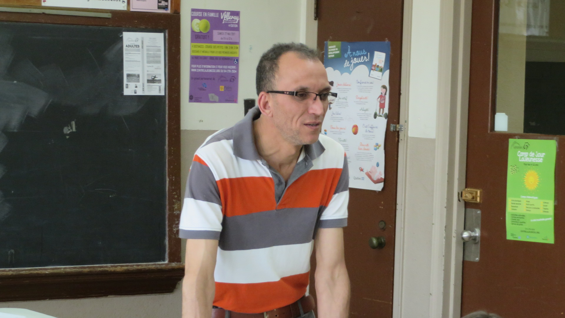 Nassir Beroual , enseignant de langue chaoui oral de l'Association culturelle Zerfa Chaoui Québec, professeur dans le domaine technique This is an image of "African people at work" from Algeria